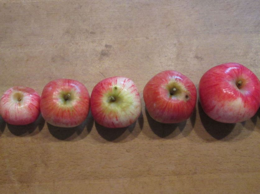 Maunzen mit ihrer charakteristischen, eckigen Form.